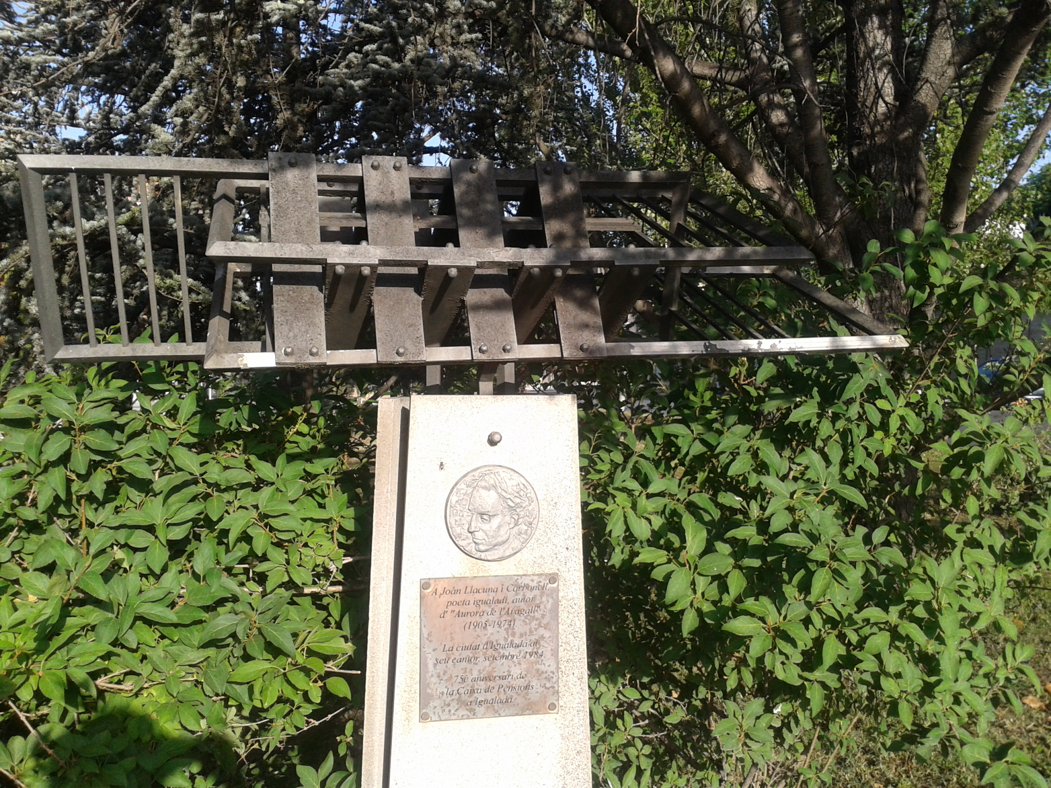 Monument a Joan Llacuna instal·lat el 1984 a la cruïlla Avinguda Gaudí amb Avinguda Balmes (Igualada). Imatge de 2012. El desembre de 2014 el monument va ser traslladat a la plaça del Rei (Igualada), un lloc més emblemàtic i central en l’imaginari poètic de Joan Llacuna.